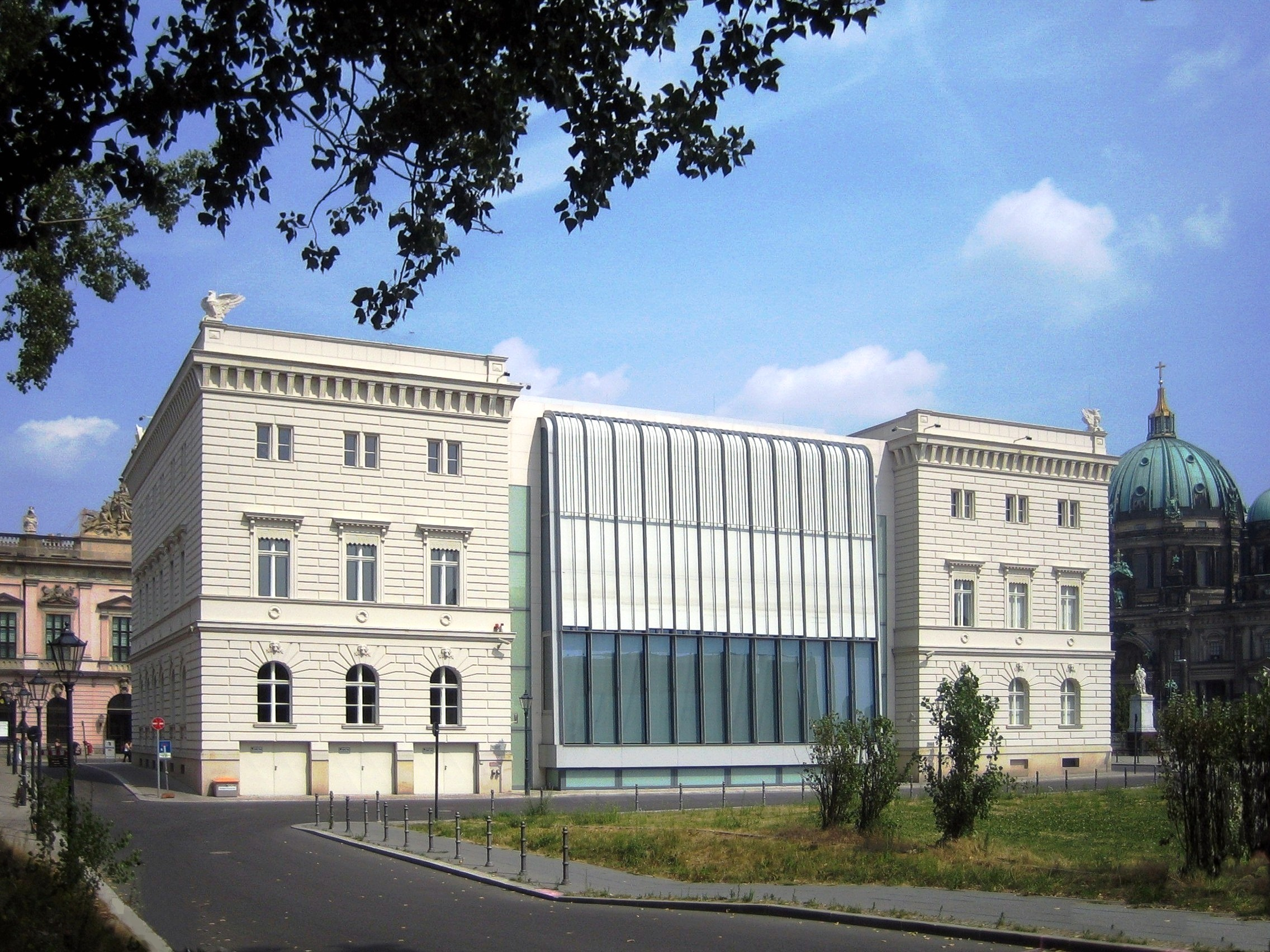 The so called "Kommandantenhaus", Berlin, Unter den Linden No. 1. Reverse side.